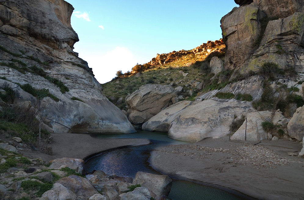 Aidone EN_Sicilia:il torrente Gresti ai piedi del Castello di Pietratagliata, lato nord